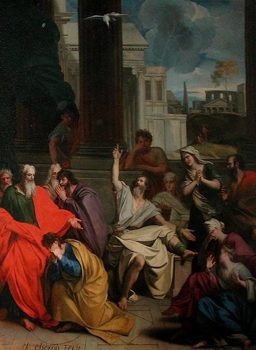 Le prophète Agabus prédisant à saint Paul ses souffrances à Jérusalem, Notre-Dame de Paris